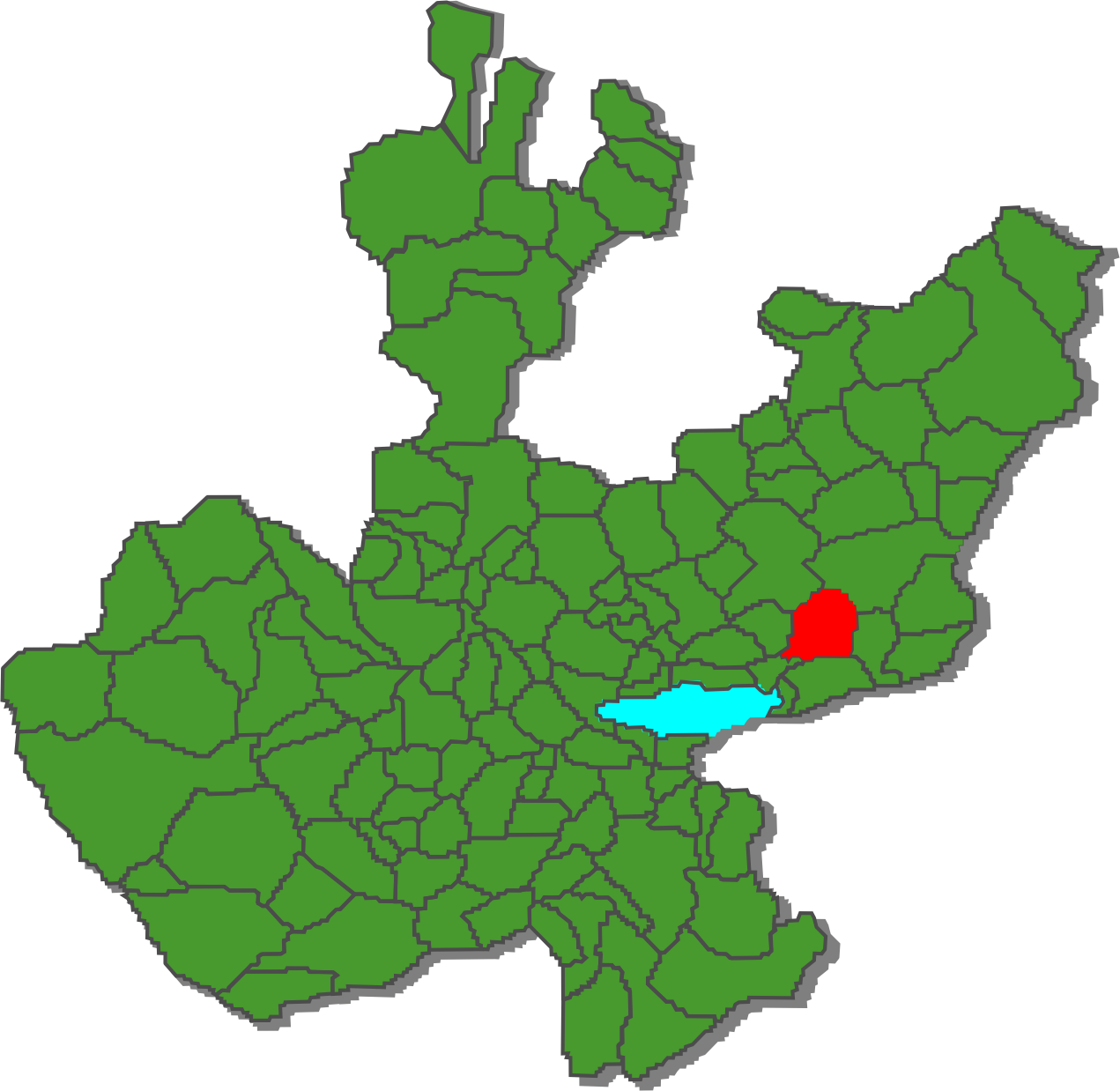 Mapa de ubicación del municipio "Atotonilco el Alto" en Jalisco.